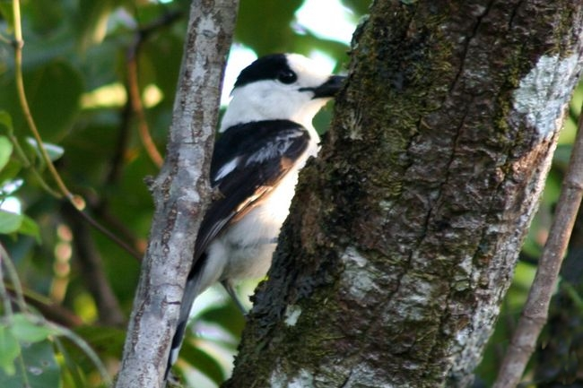 Vanga écorcheur